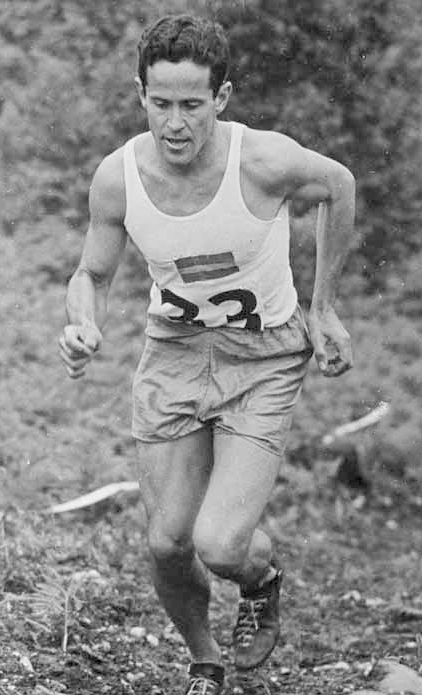 William Grut